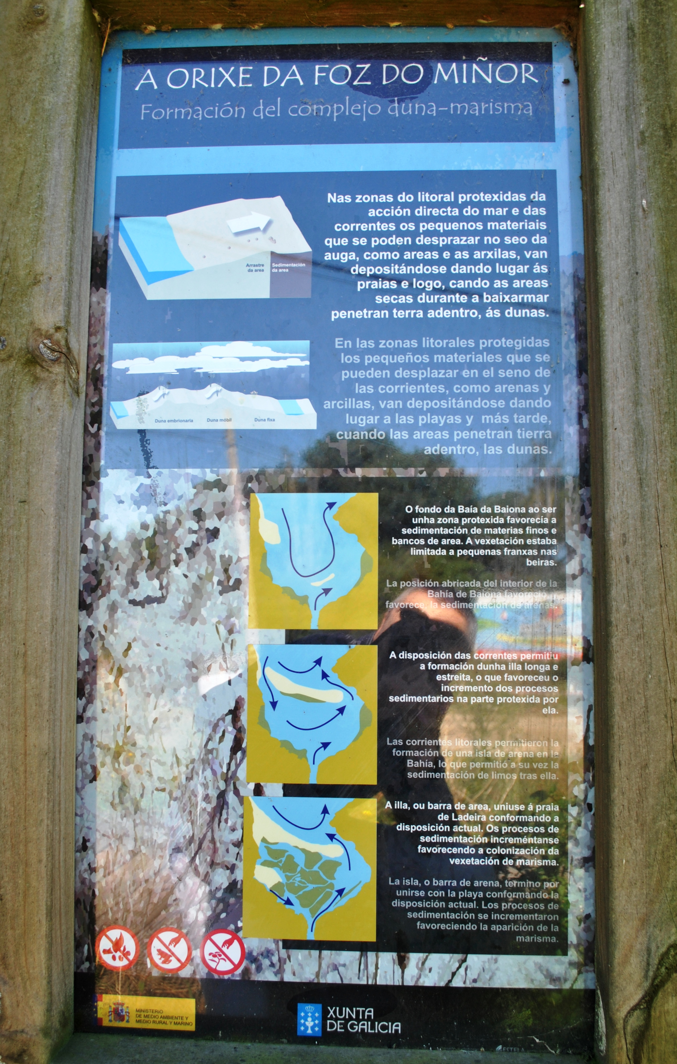 Véxase o título e as categorías.